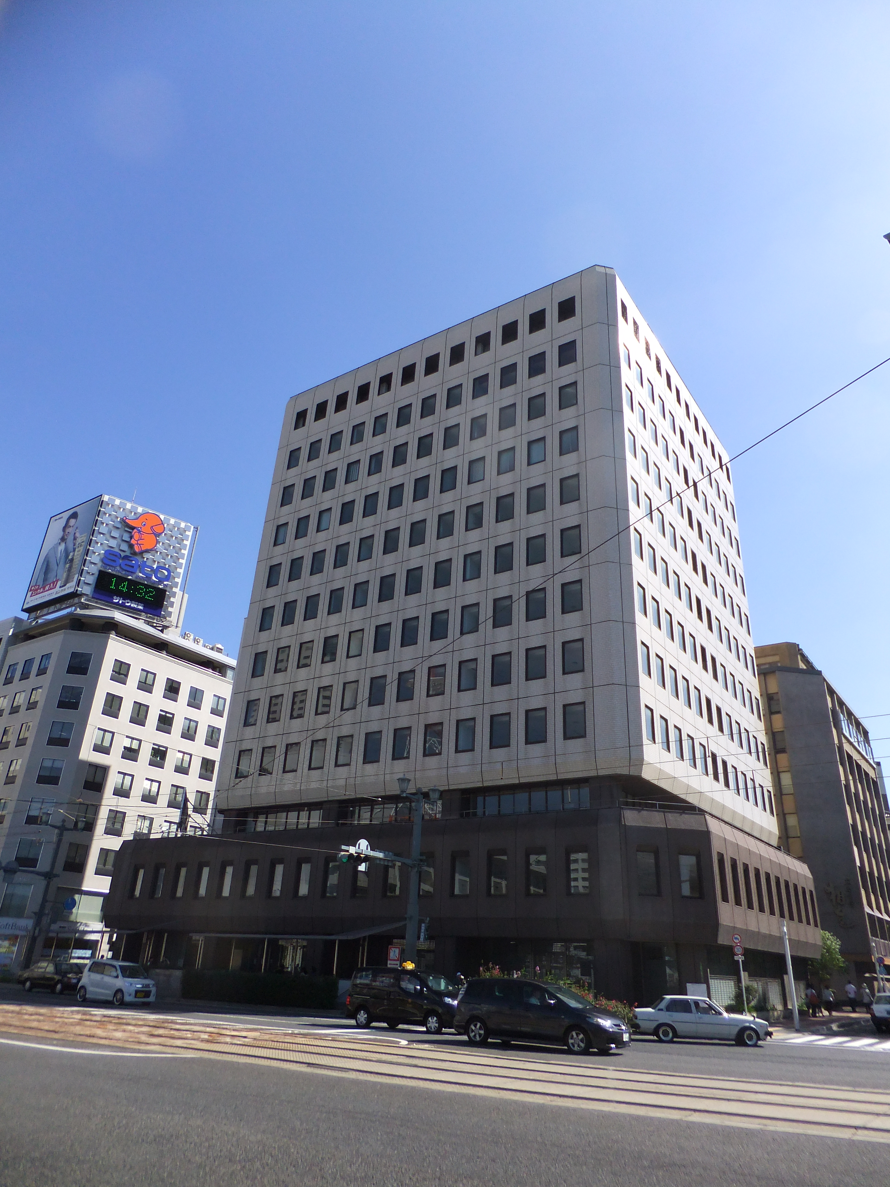 広島マツダ大手町ビル